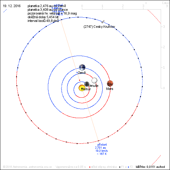 Orbita planetky Český Krumlov